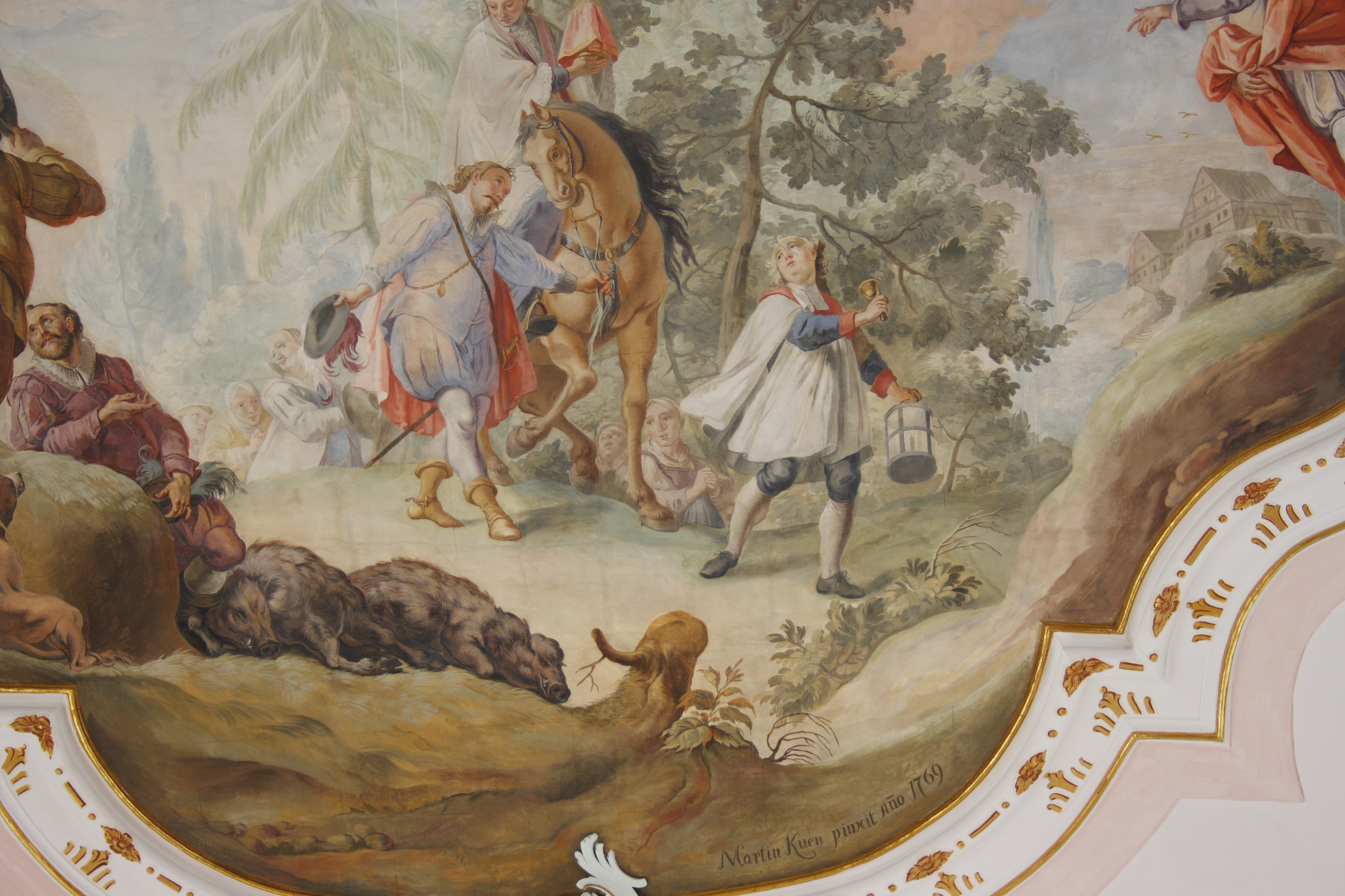 Katholische Pfarrkirche Mariä Himmelfahrt in Scheppach, einem Ortsteil von Jettingen-Scheppach im Landkreis Günzburg (Bayern), Stuck von 1769/70; Deckenfresko im Langhaus von Franz Martin Kuen (Ausschnitt), Darstellung: Rudolf von Habsburg überlässt einem Priester sein Pferd; Signatur: Martin Kuen pinxit anno 1769